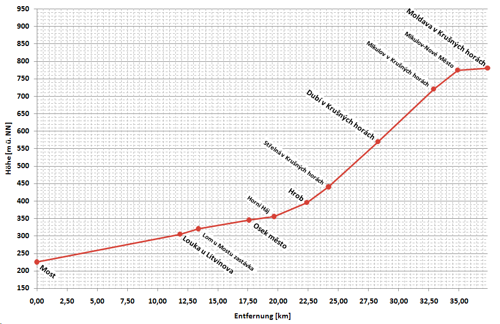 vereinfachtes Höhenprofil Most-Moldava v Krušných horách